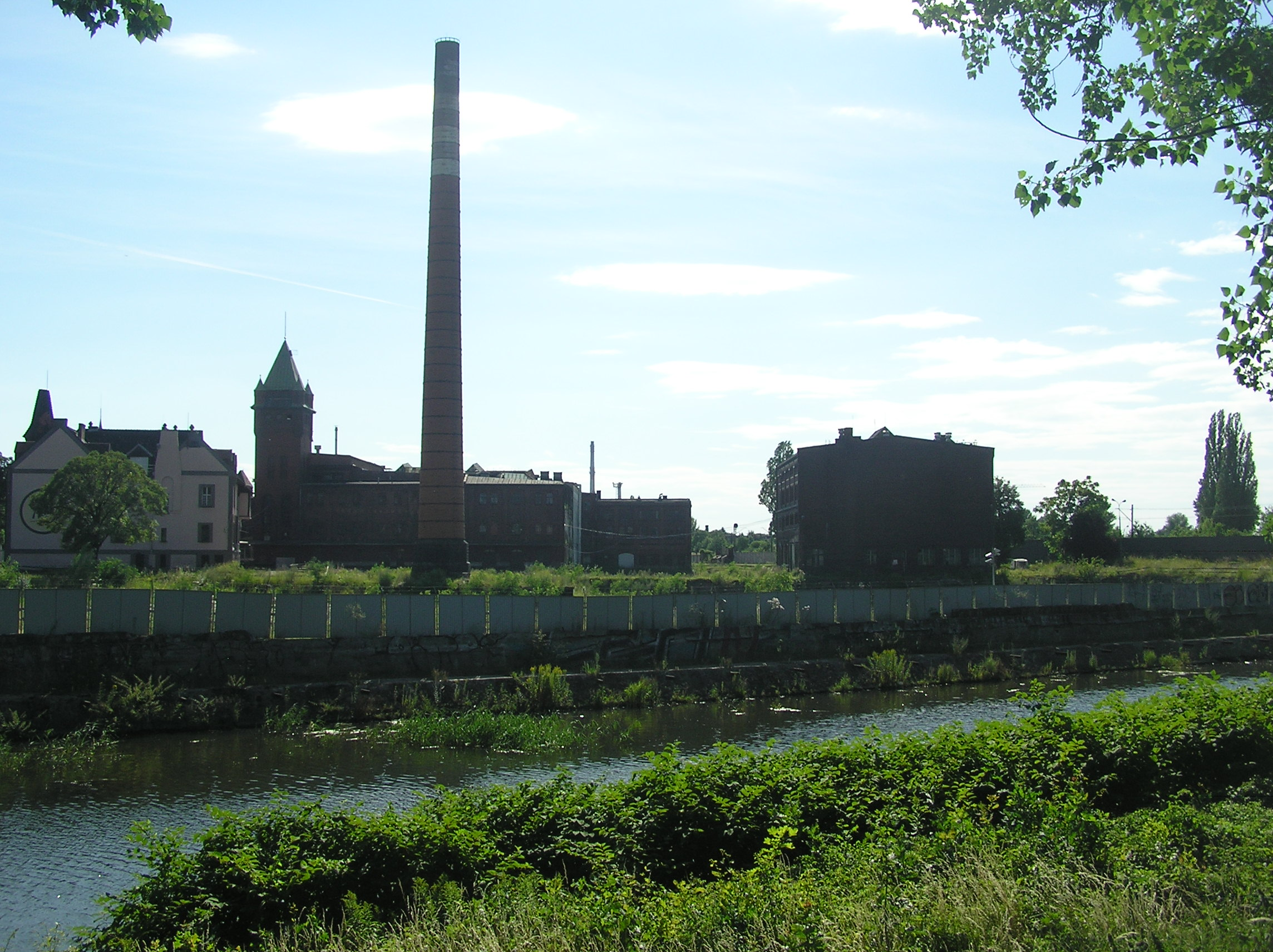 Wrocław, Kanał Miejski, Nabrzeże Browaru Piastowskiego